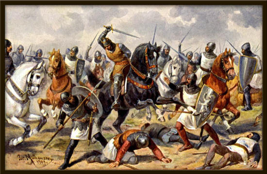 Čechové před Milánem roku 1158. Když Češi překročili řeku Addu, vyřítili se na ně Milánští a v boji padlo mnoho Čechů i Milánských. Zatím však opraven most, po němž přešli Němci a Milán se musil vzdát.